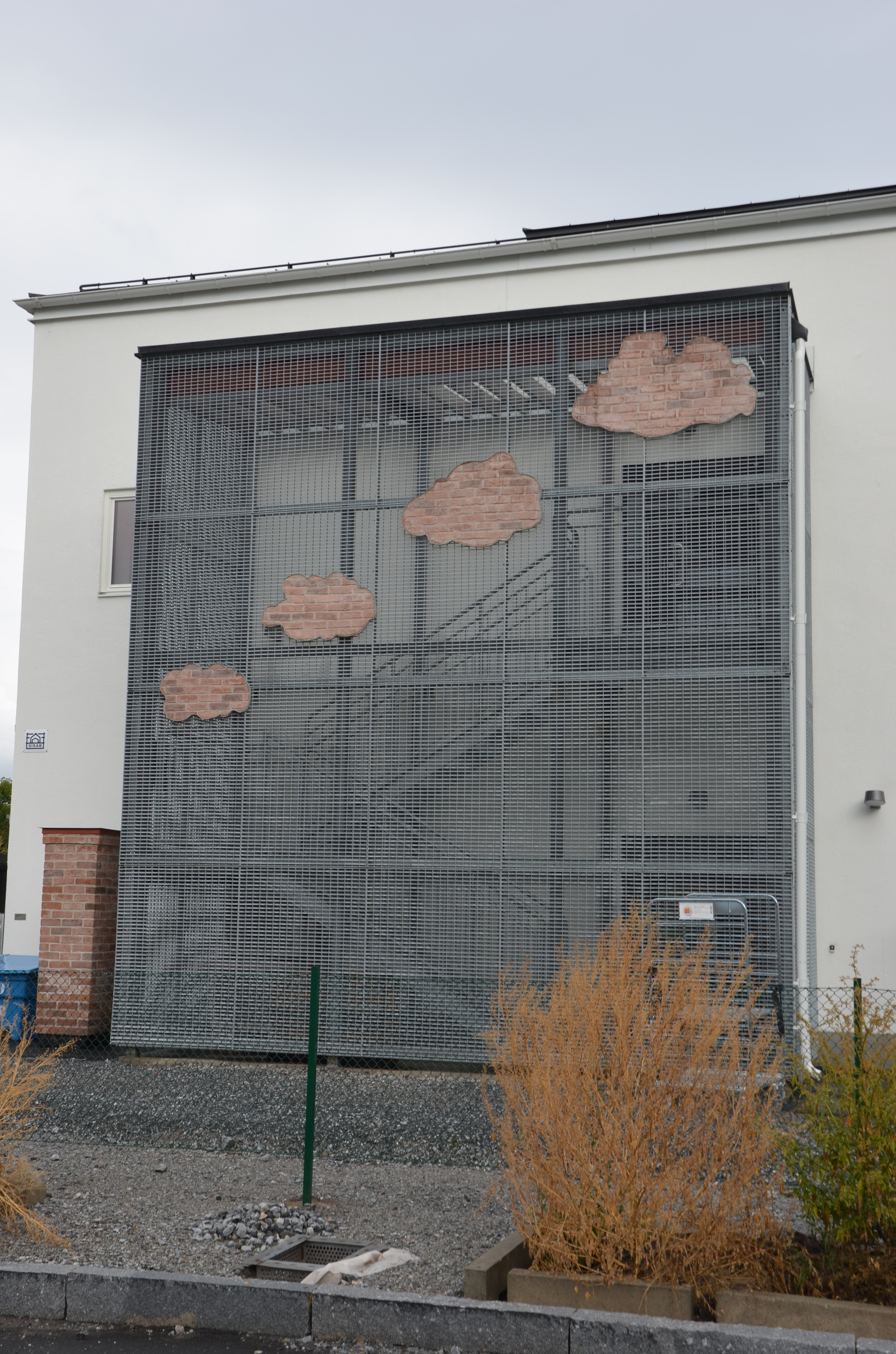 Lera + eld = tegel av Ulrika Jansson, förskolan Pippi Långstrump¨, Pippi Långstrumps gata 12 i Annedal i Stockholm